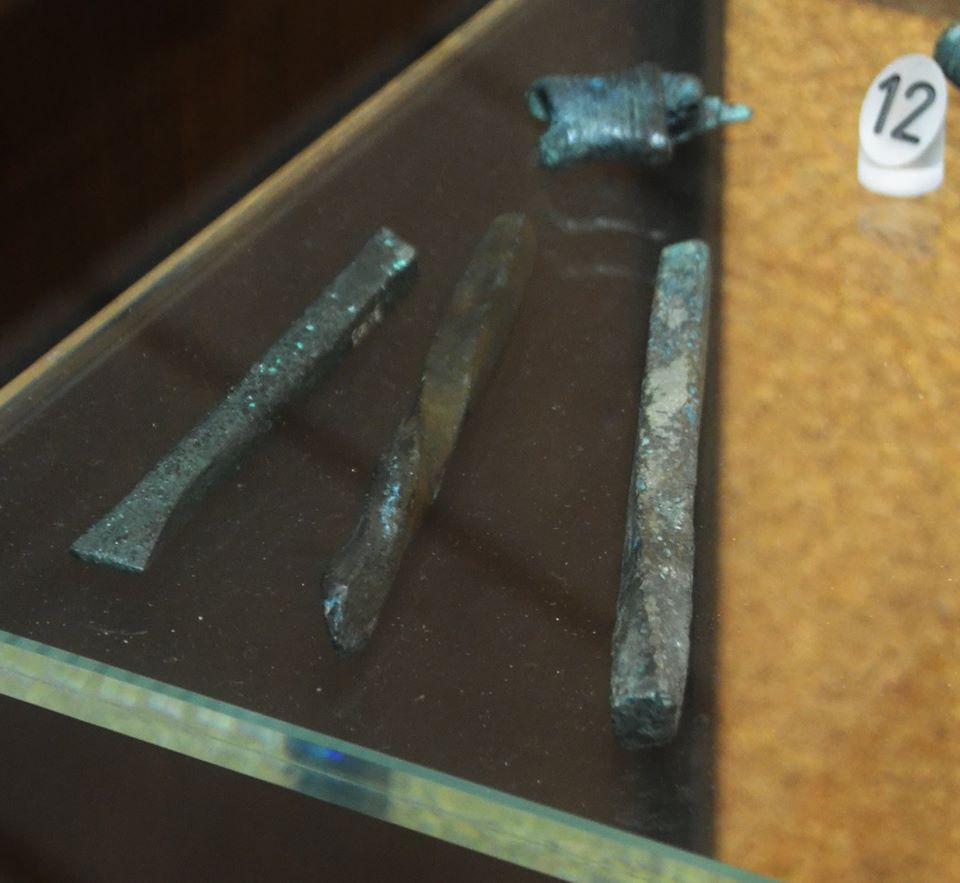 Da sinistra a destra: punta di scalpello e di trapano da vari siti nuragici. Museo archeologico nazionale di Cagliari.